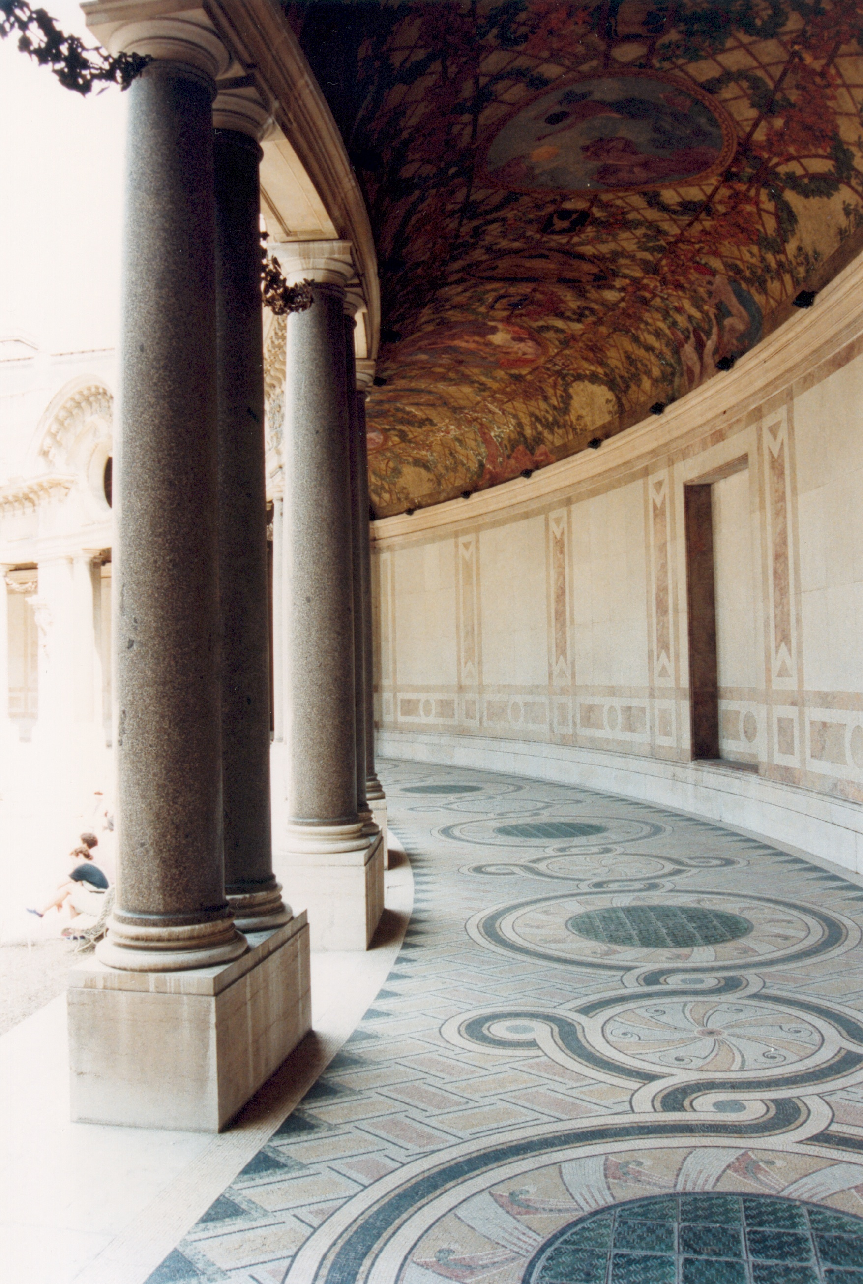 France Paris Petit Palais Photographie prise par GIRAUD Patrick